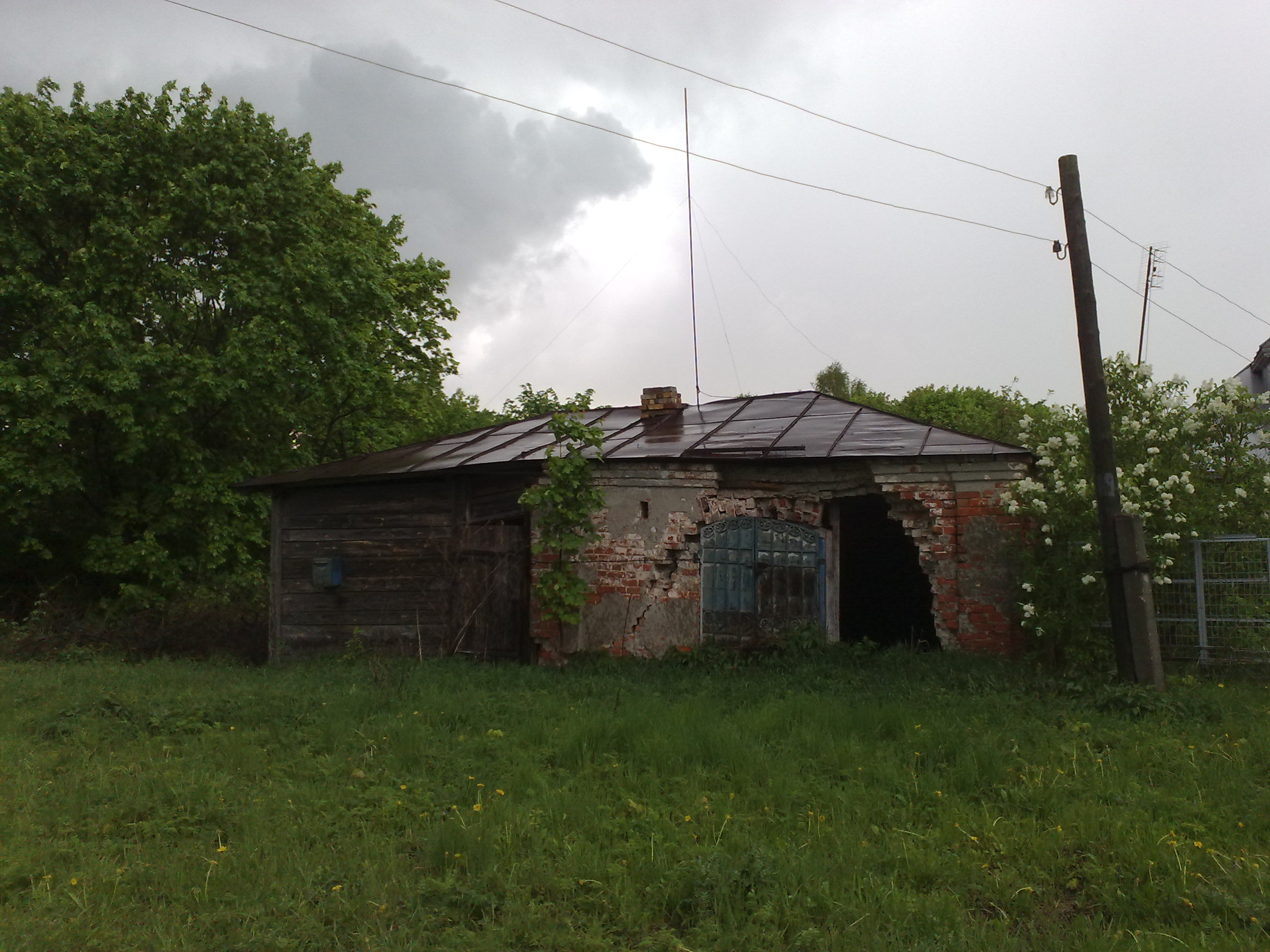 Деревня Кулаково, Вачский район, Нижегородская область. Полуразрушенное здание магазина.